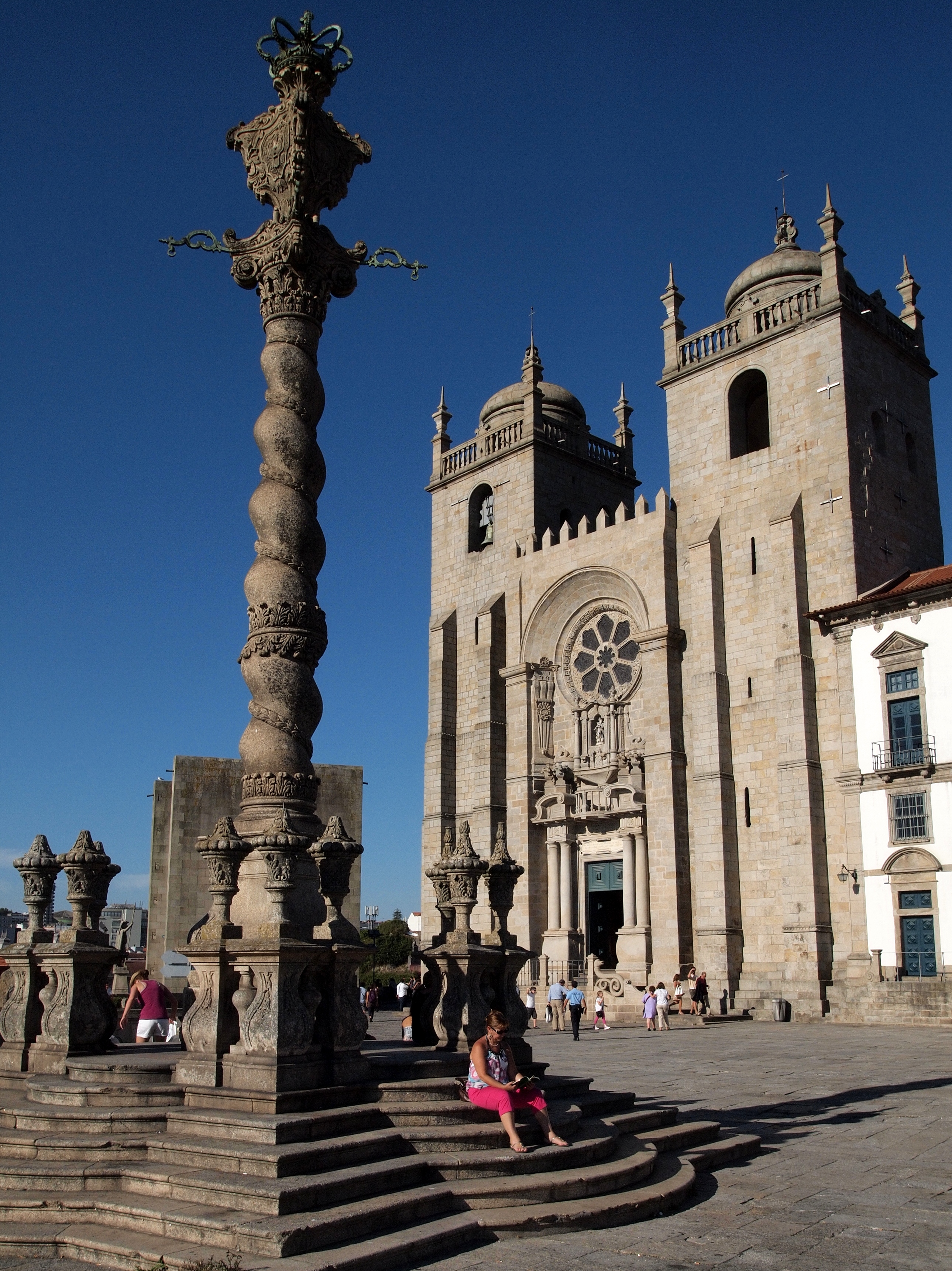 Porto